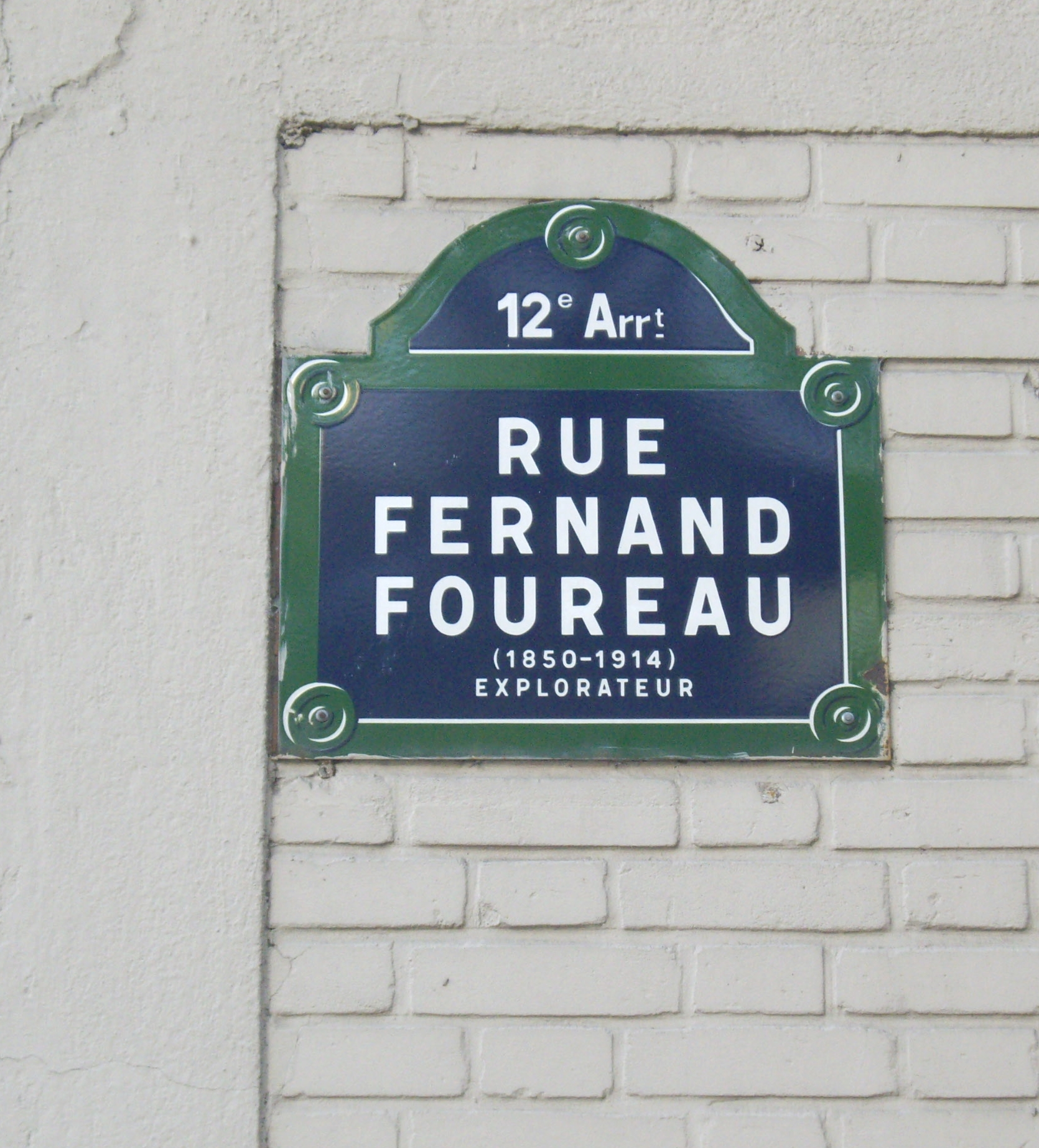 Rue Fernand-Foureau, Paris 12e. « Fernand Foureau (1850-1914), explorateur. »